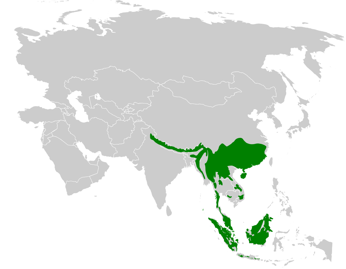 Ixos distribution map